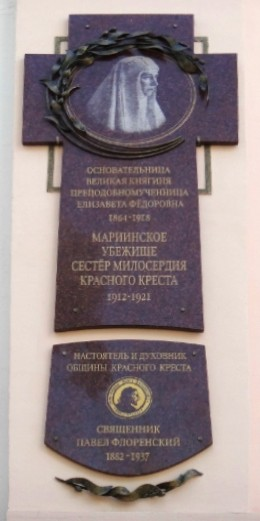 Основательница Великая Княгиня преподобномученица Елизавета Федоровна 1864-1918